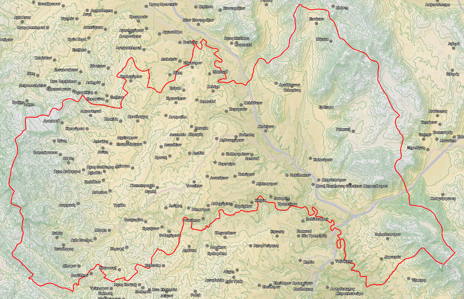 Τοπογραφικός χάρτης του Δήμου Βοΐου